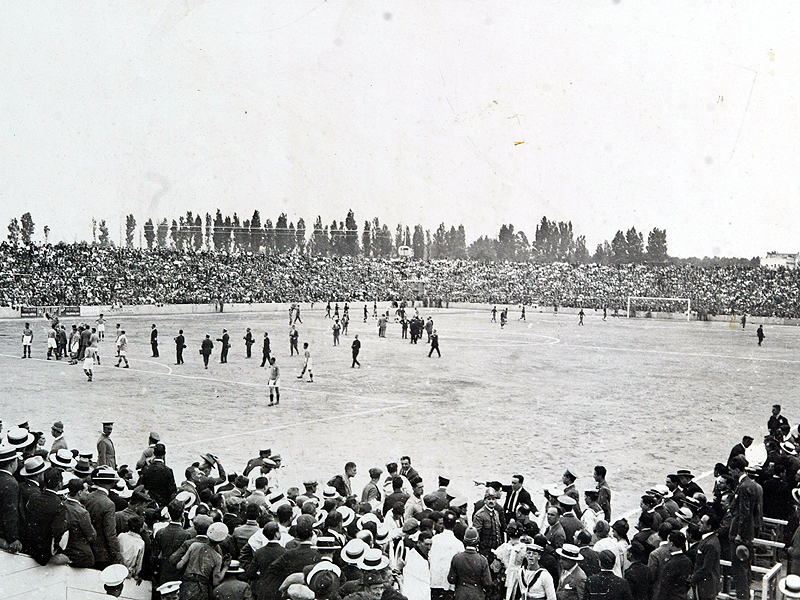 Fotografia d'un partit a Mestalla